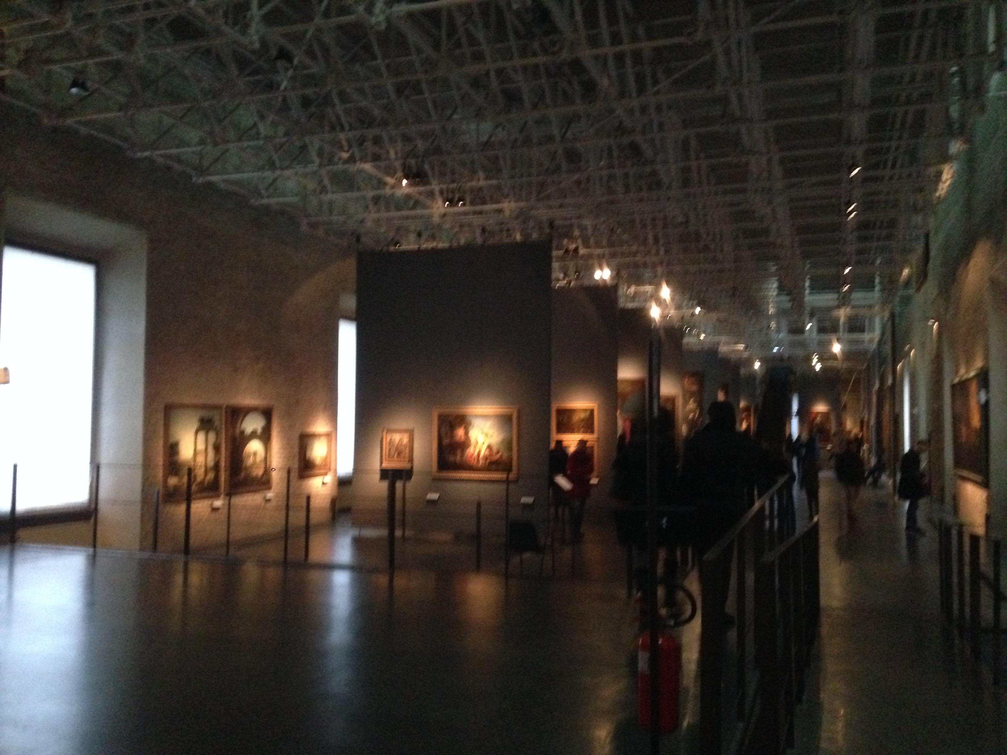 Galleria nazione di Parna